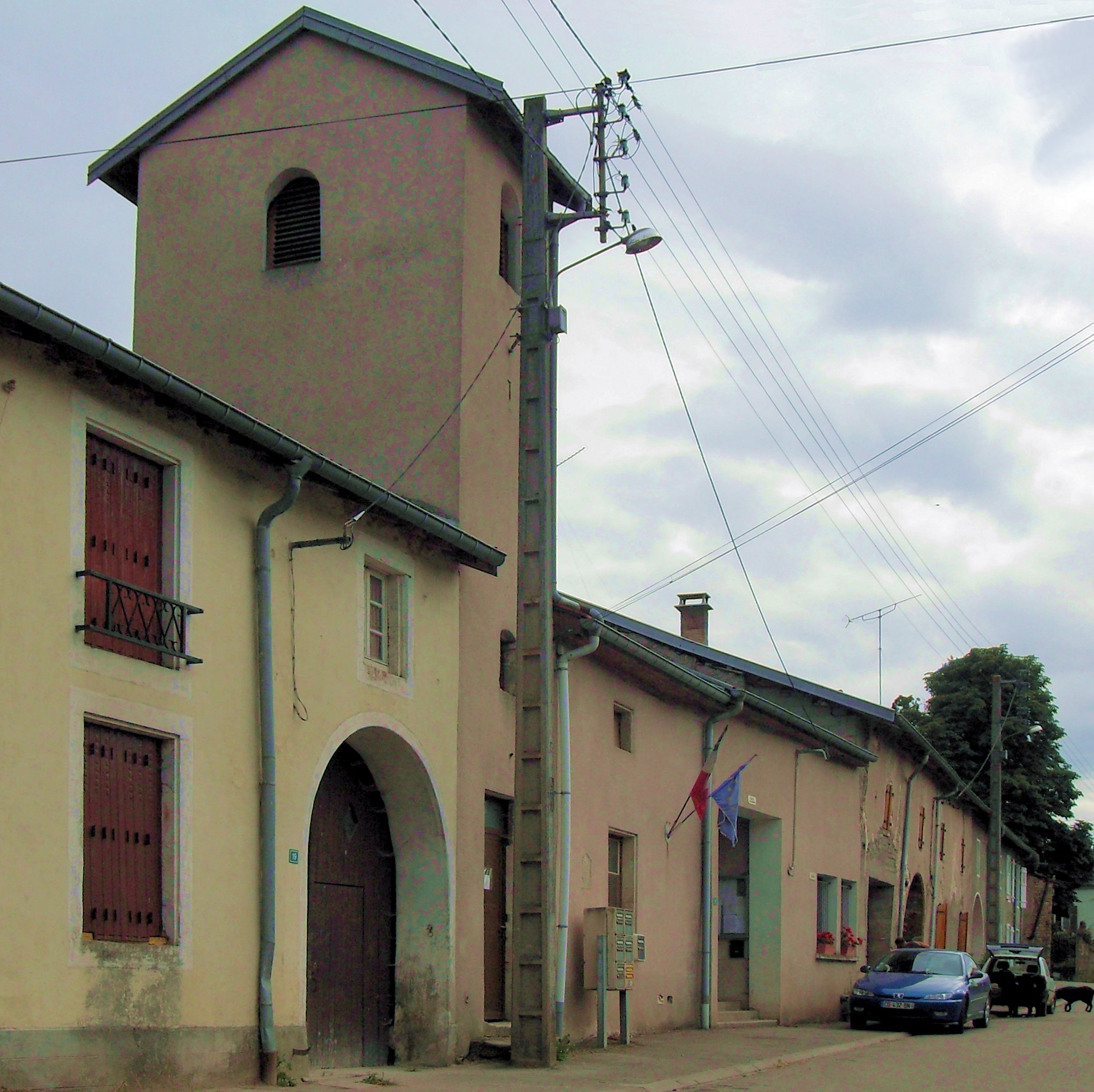 La mairie du Pont-sur-Madon